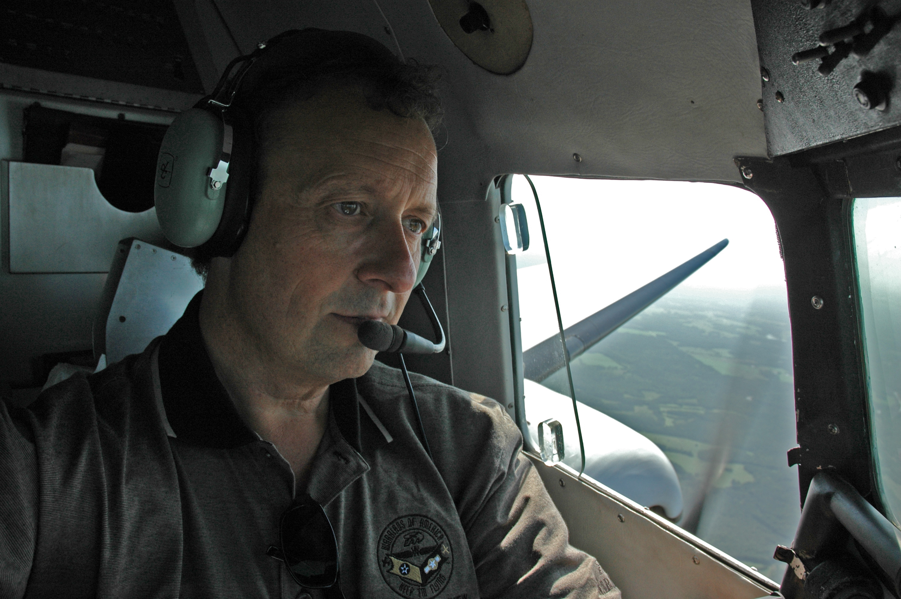 Kurt Braatz im August 2009 bei der Überführung einer Douglas DC-3 von Oshkosh nach Atlanta